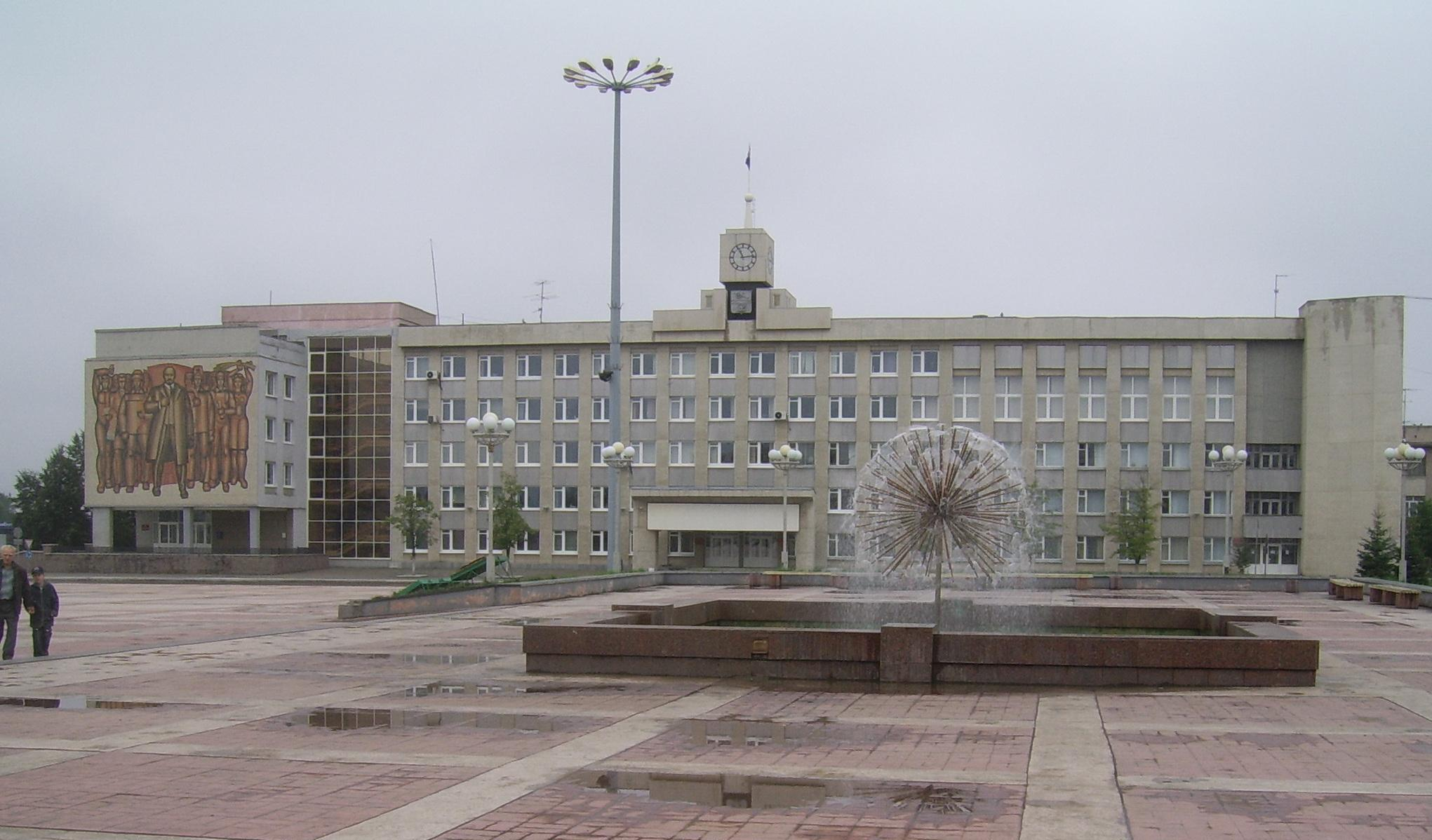 Stadhuis van Kamensk-Oeralski. Links een allegorische afbeelding van Lenin. Bovenop onder de klok het stadswapen (met de kanonnen).